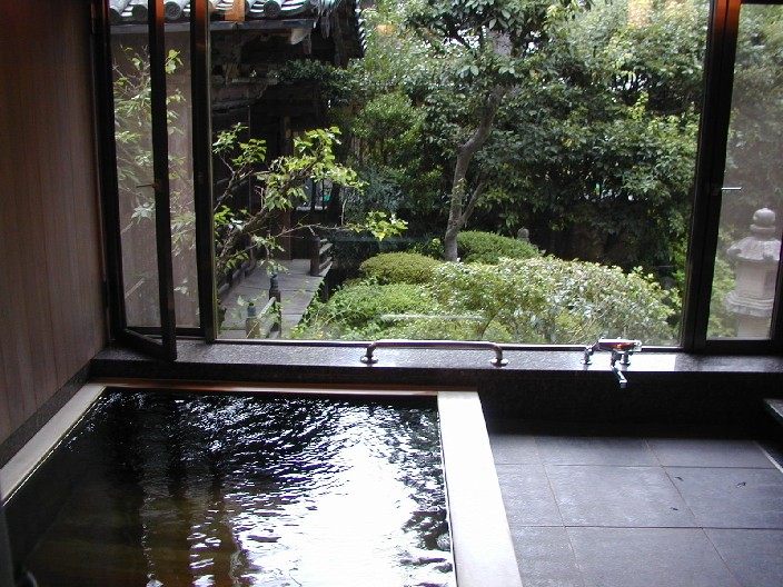 Ryokan giapponese - Ryokan ofuro - Il bagno tradizionale ofuro non serve a lavarsi, infatti ci si lava prima fuori dalla vasca, e ha il solo fine di rilassare. La temperatura dell'acque è elevatissima. La vasca è costruita con prezioso legno di cipresso giapponese.